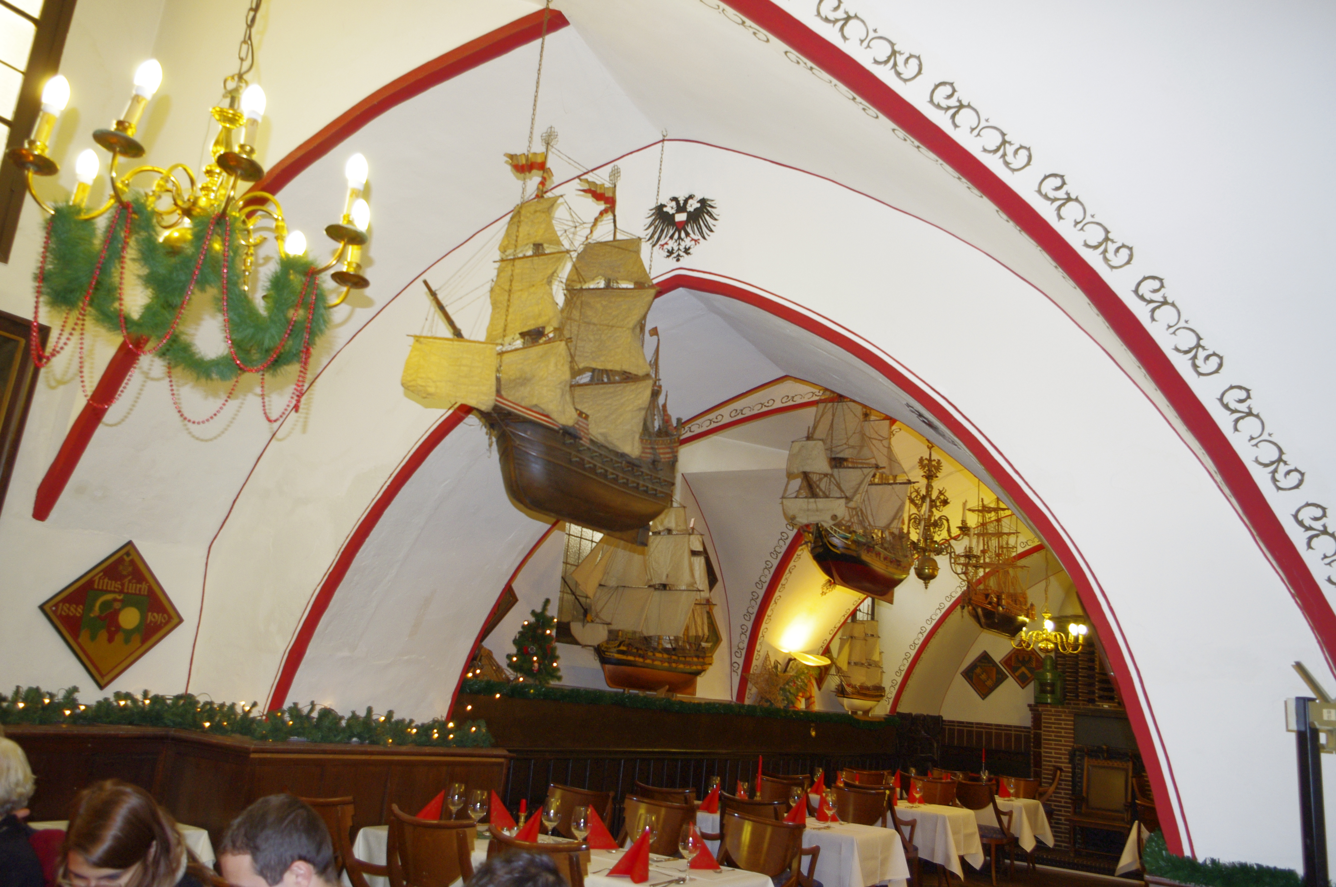 Ratskeller, Lübeck während des Weihnachtsmarktes 2011.